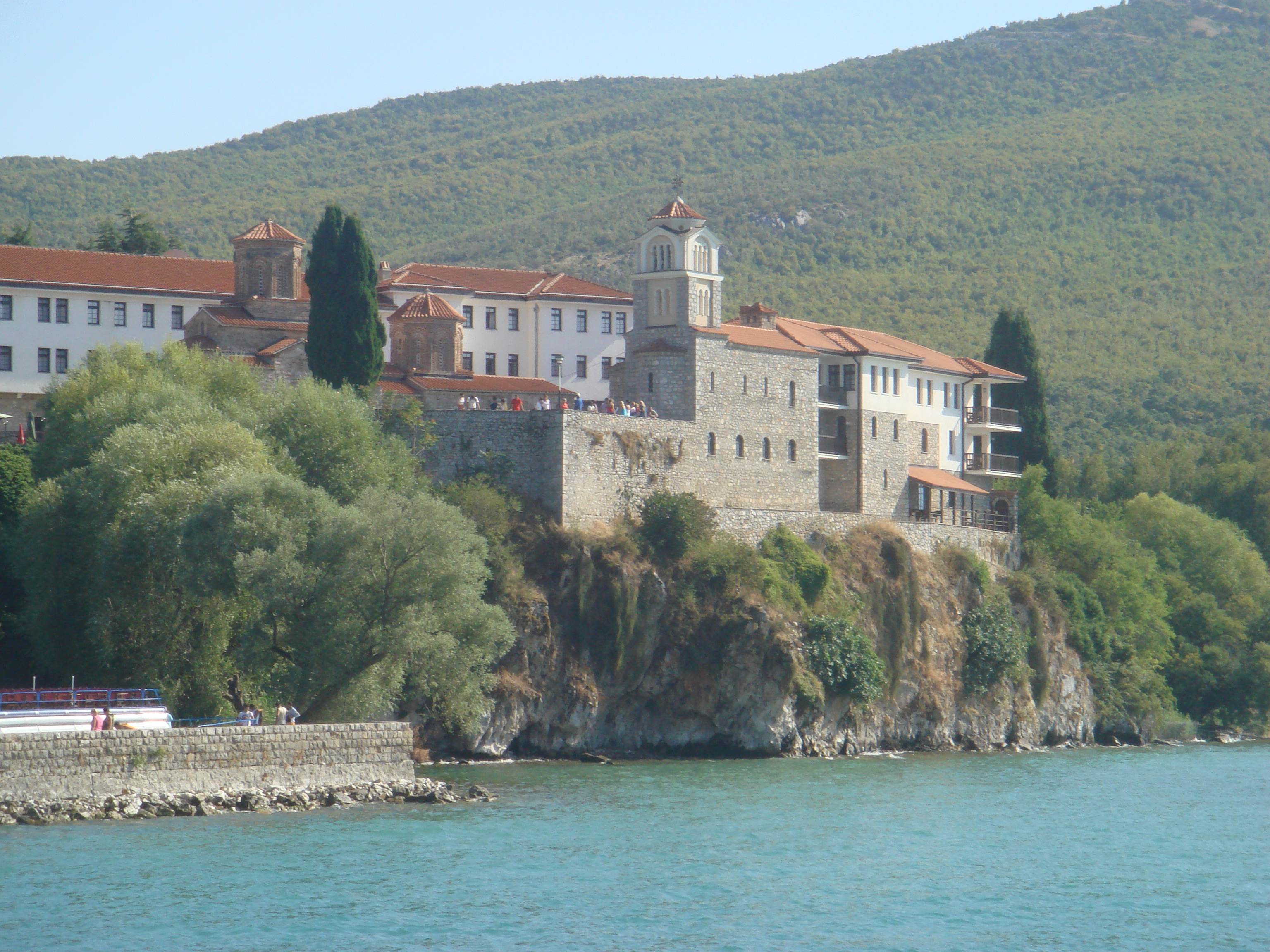 Црква Свети Наум (Church of St. Naum)